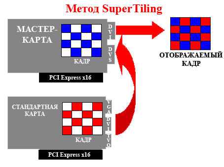 Алгоритм построения изображения в CrossFire